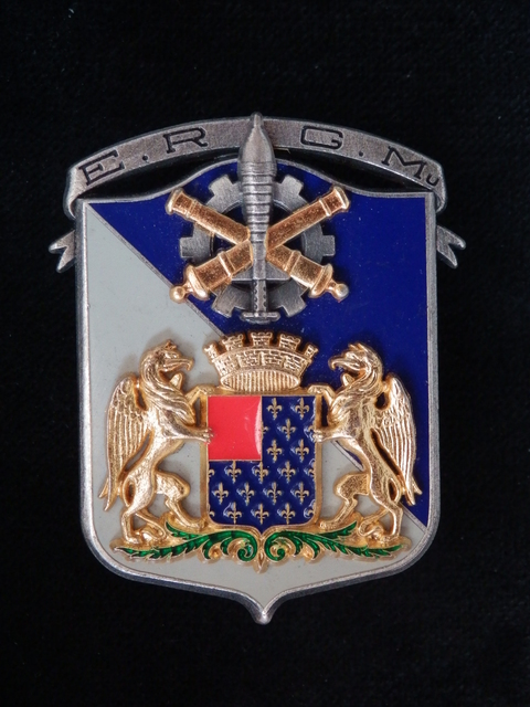 Insigne de l'Établissement de Réserve Générale de Munitions de Thouars